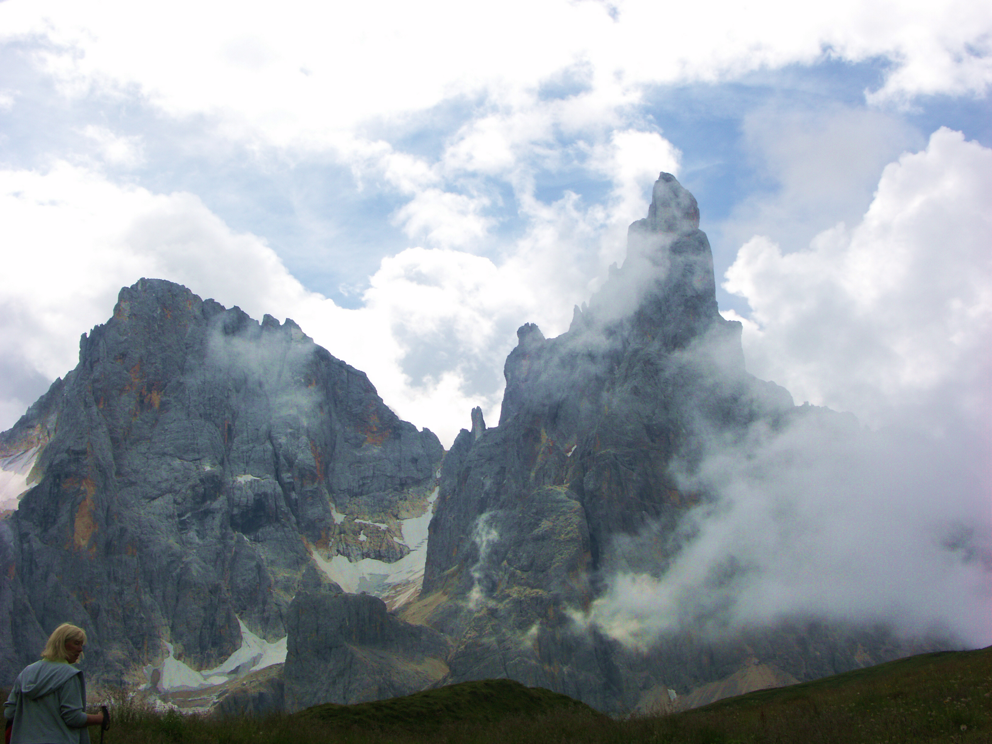 Italien, Dolomiten, Pala-Gruppe, links: Cima della Vezzana (3.192 m) und rechts: Cimon della Pala (3.184 m) vom Passo Rolle aus gesehen